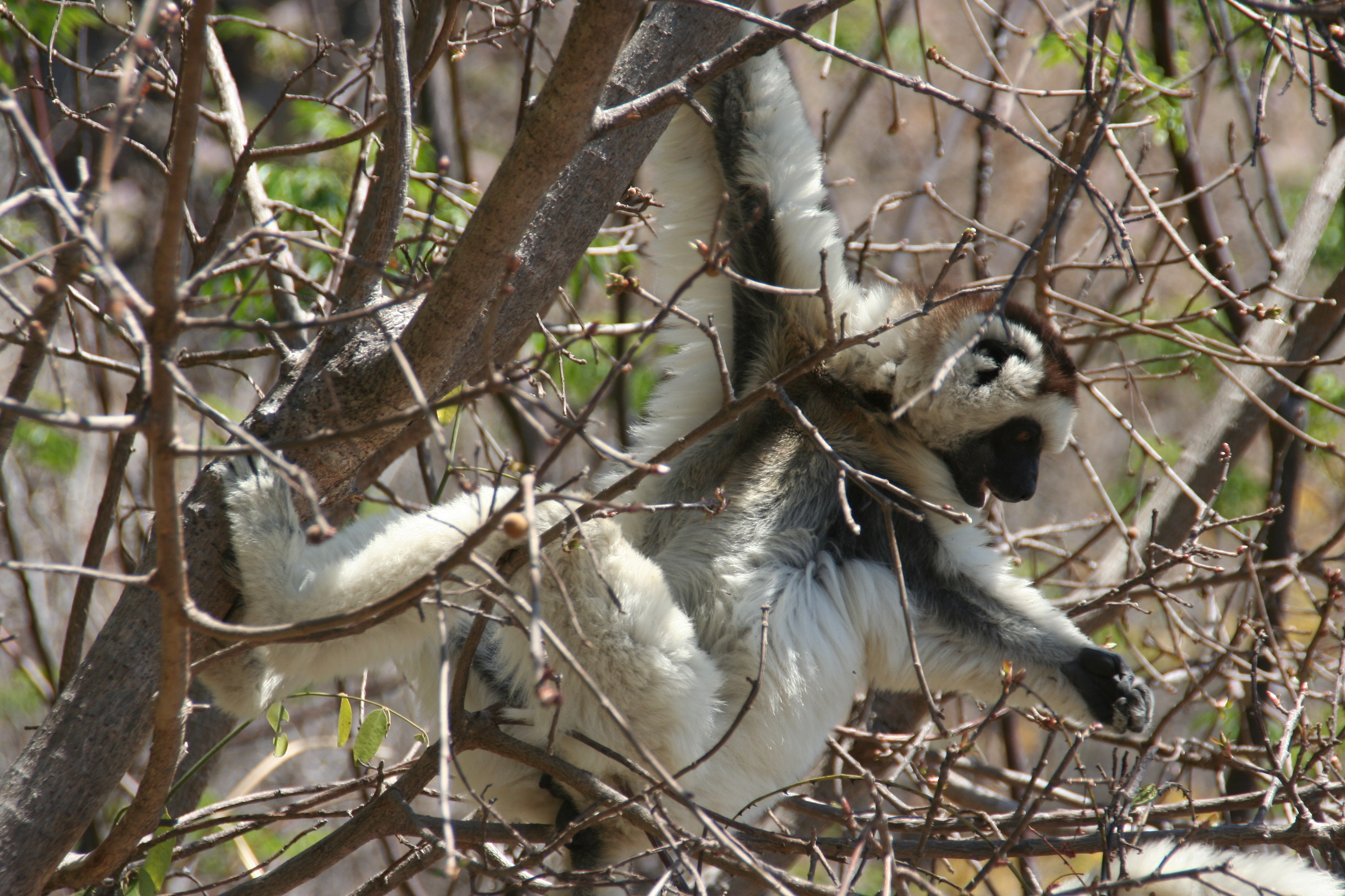 lémurien Propithèque de verreaux. Propithecus verreauxi Parc de l'Isalo, Madagascar